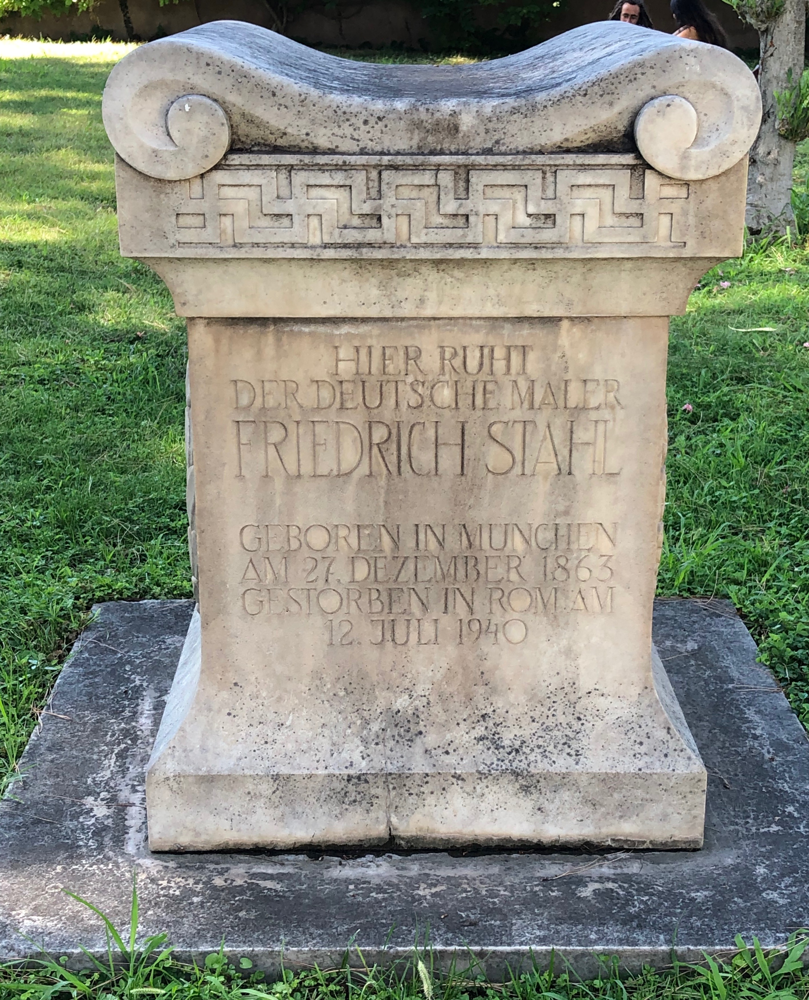 Tombe de Friedrich Stahl au cimetière anglais de Rome